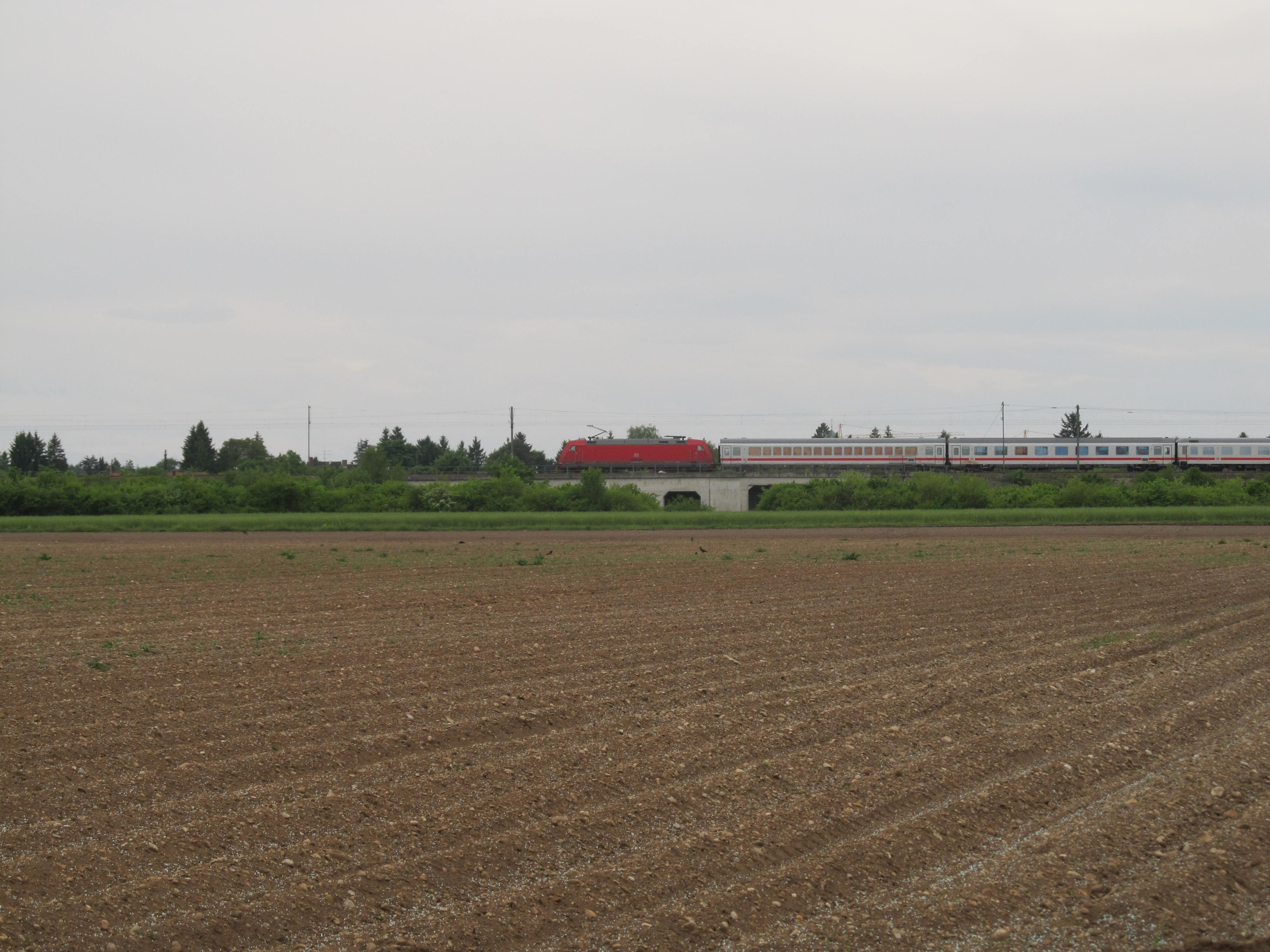 IC in Richtung München bei Trudering auf der Bahnstrecke München-Rosenheim